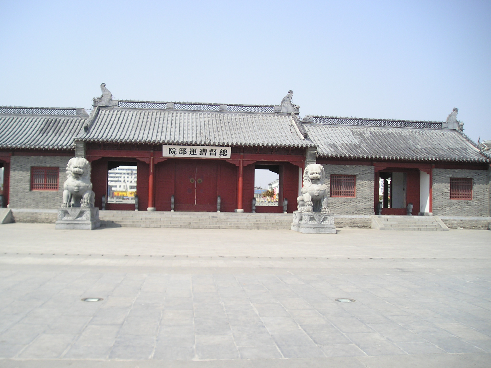 自己拍摄